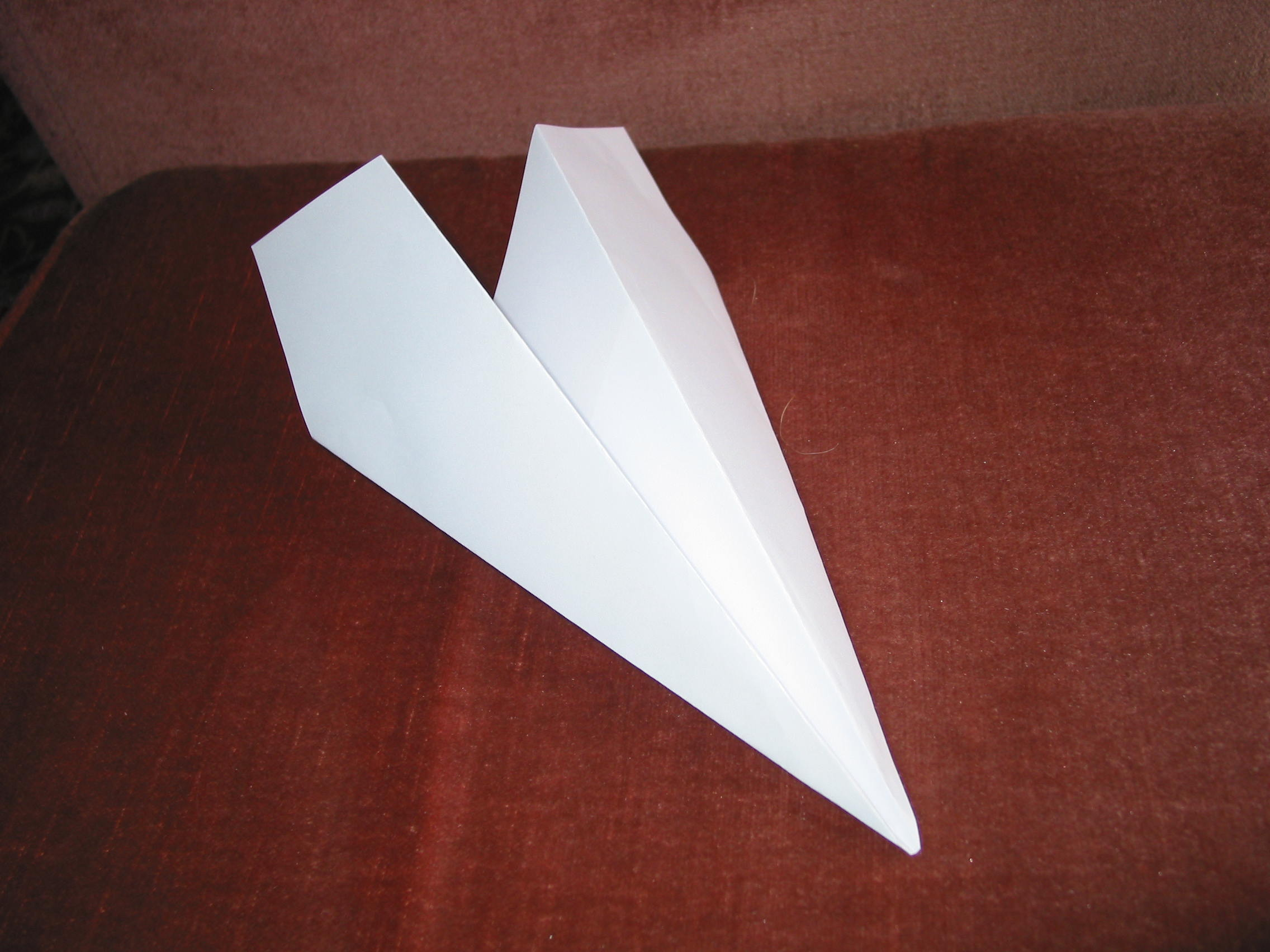 perinteinen paperista taivutettu lennokki